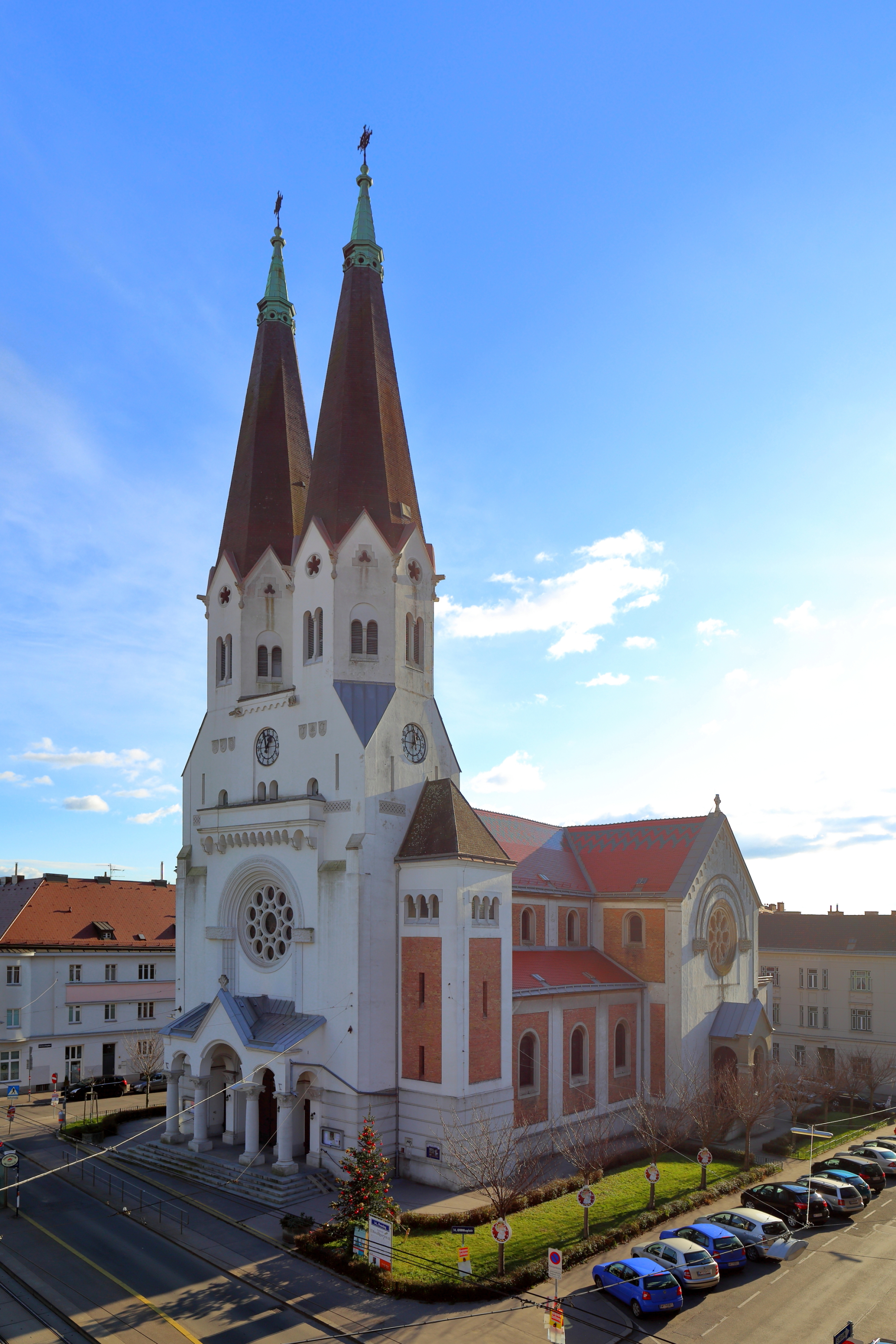 Nordwestansicht der röm.-kath. Pfarrkirche Hl. Anna in Baumgarten, 14. Wiener Gemeindebezirk.